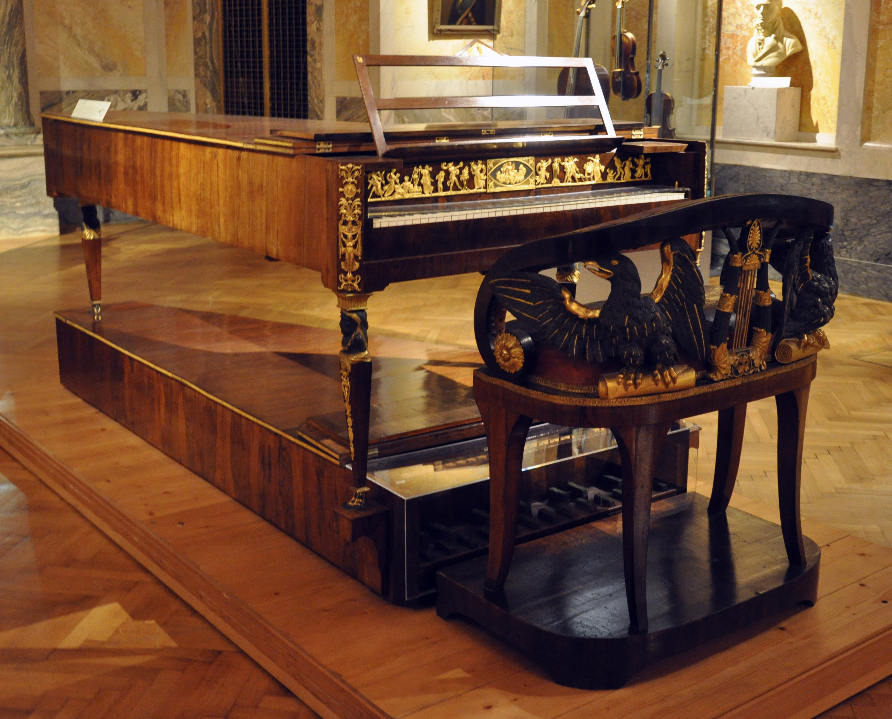 Pedal-Hammerflügel mit Bank, Joseph Brodmann, Wien um 1815. Wien, Kunsthistorisches Museum, Sammlung alter Musikinstrumente (Neue Burg), Inv. Nr. SAM 646.